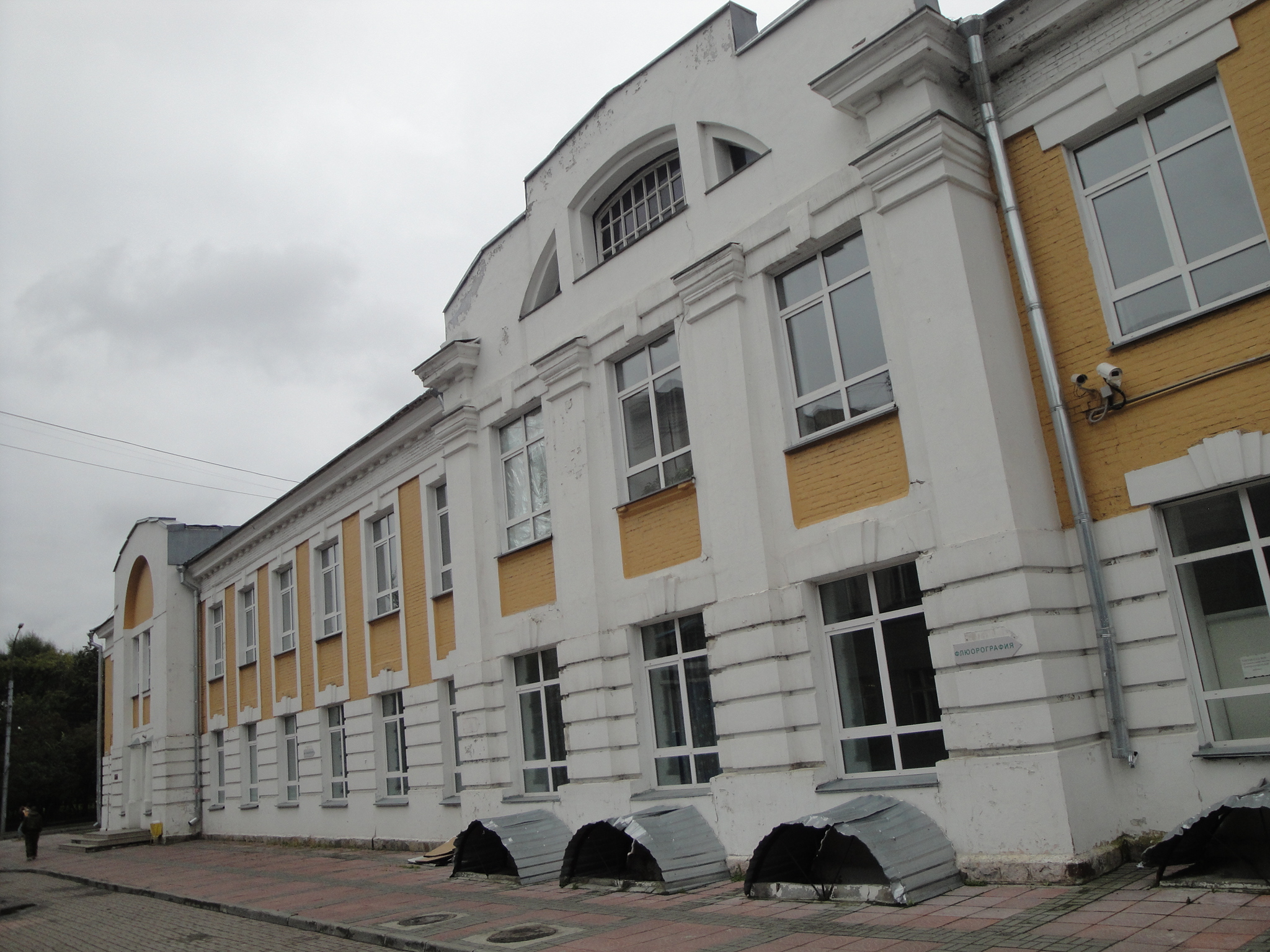 (Новосибирская область, Новосибирск, Щетинкина улица, 54)